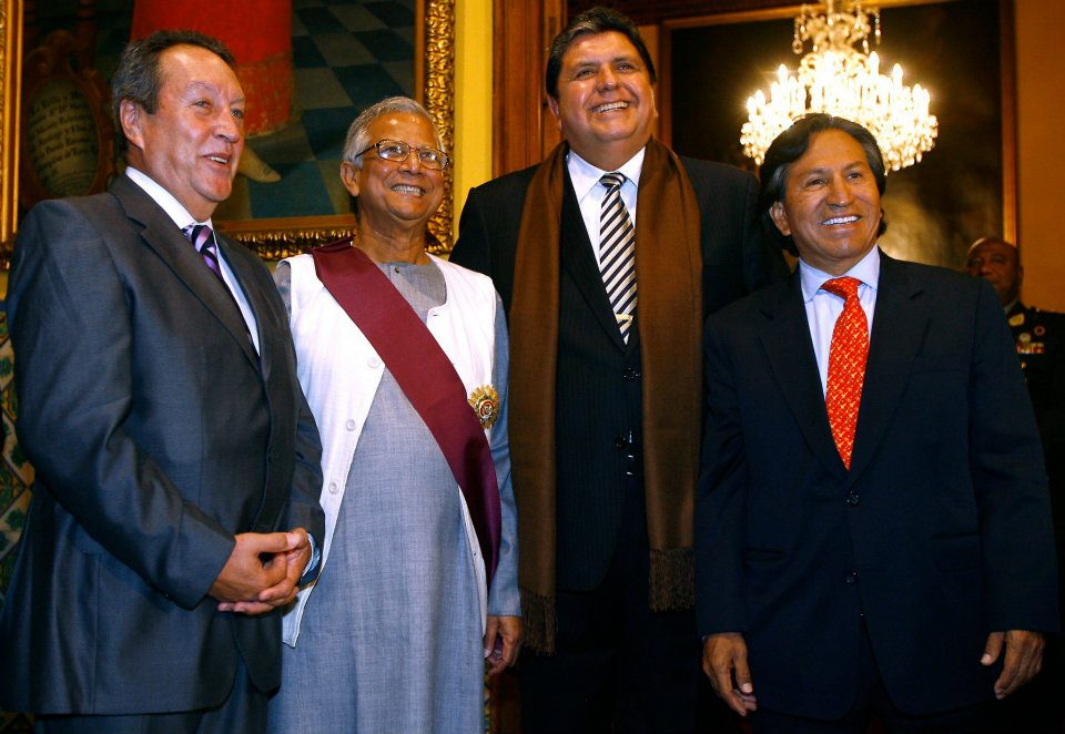 Los microcréditos son de vital importancia para propiciar el desarrollo económico y social con equidad, además es un elemento de integración social. En Guatemala y Centroamérica puede explotarse aún más, hay mucho potencial, en especial las mujeres. La gente, mujeres y hombres, pueden cambiar significativamente la vida de sus familias. En la foto, con el Dr. Yunus, el Banquero de los Pobres y los Ex Presidentes del Perú, Alan García y Alejando Toledo.